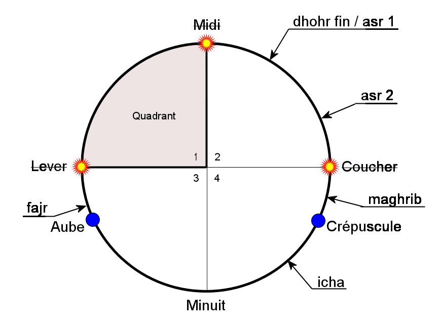 Localisation des 5 prières de l'islam.